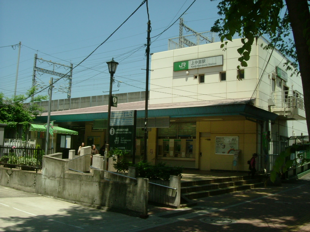 Kami-Nakazato Station 上中里駅